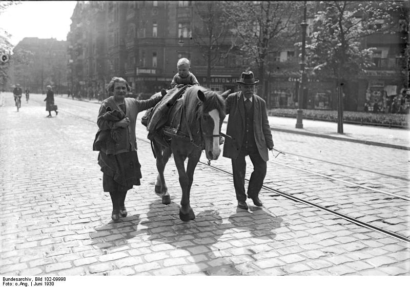 Der Kleine Reitersmann in der Grosstadt Berlin! Berliner Markthändler bringen nach Beendigung der Arbeit das Pferd in den Stall zurück und das kleine Enkelkind darf darauf reiten.